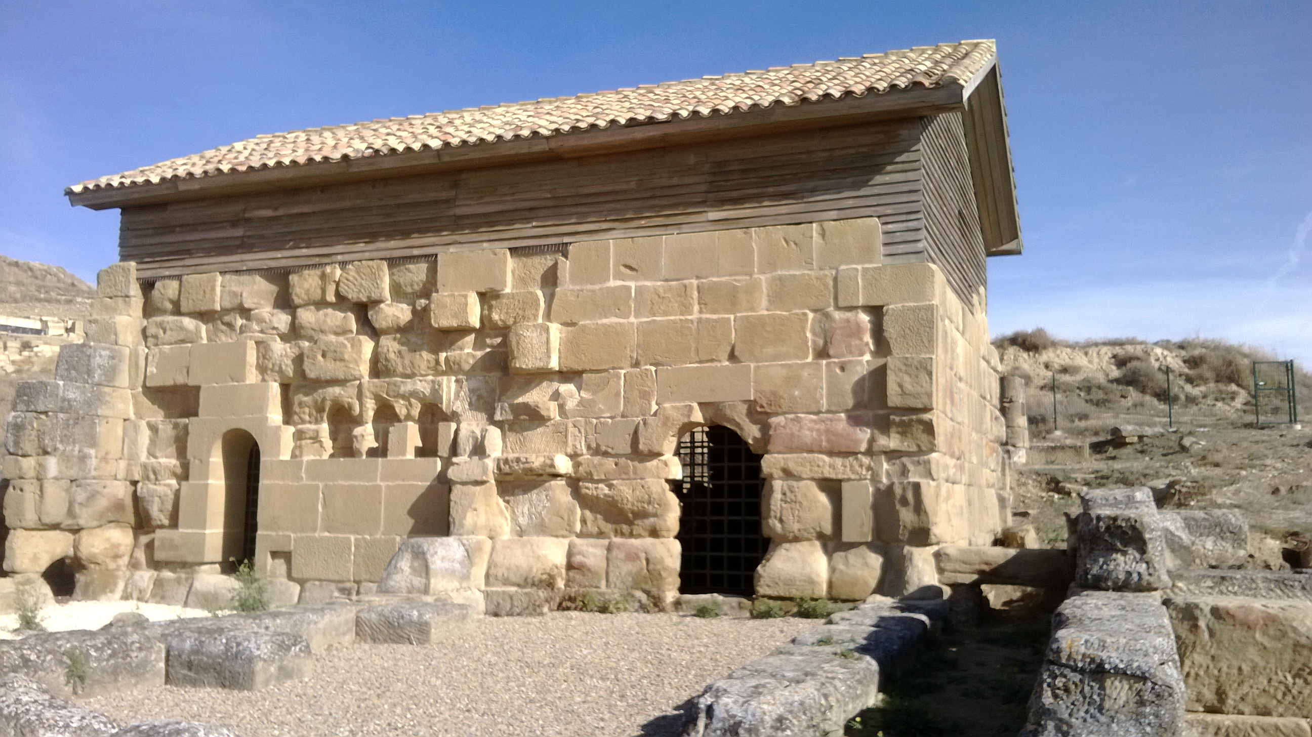 Exterior de las termas de Los Bañales